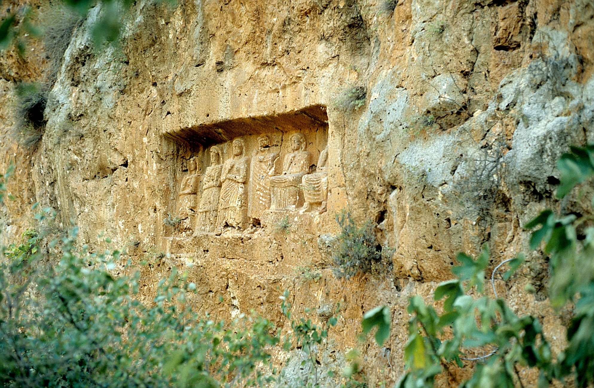 Kanytelleis/Kanlidivane, Türkei, Relief einer Familie in der Doline